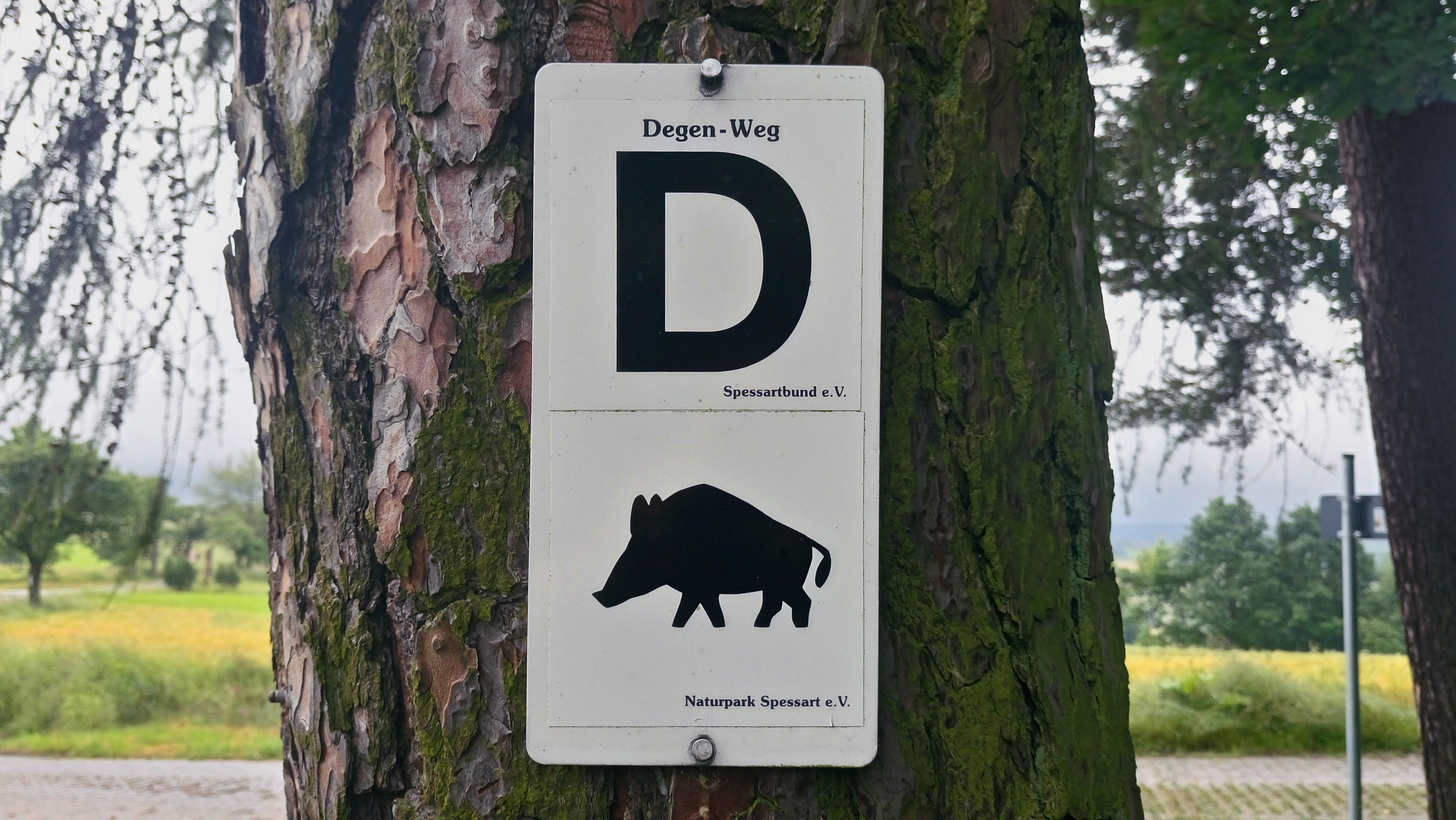 Beschilderung des Degen-Weges bei Rappach